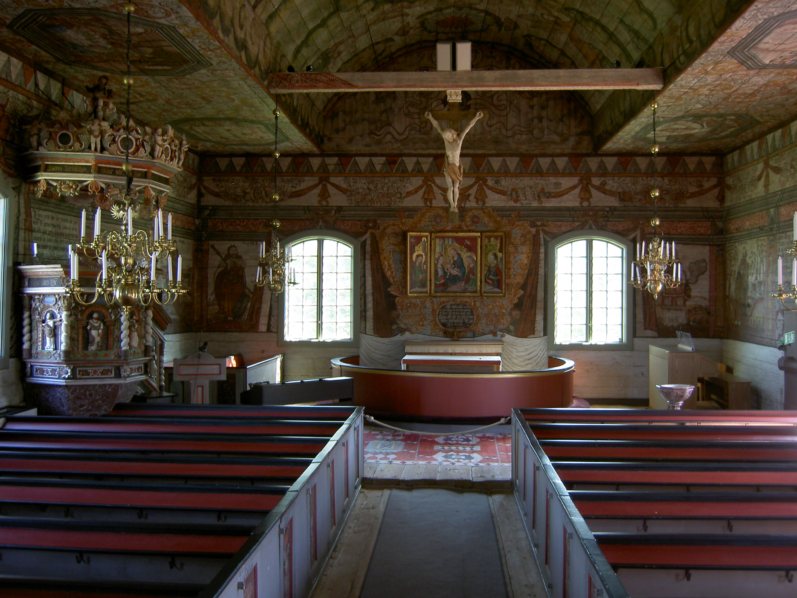 Kyrksal i Djursdala kyrka